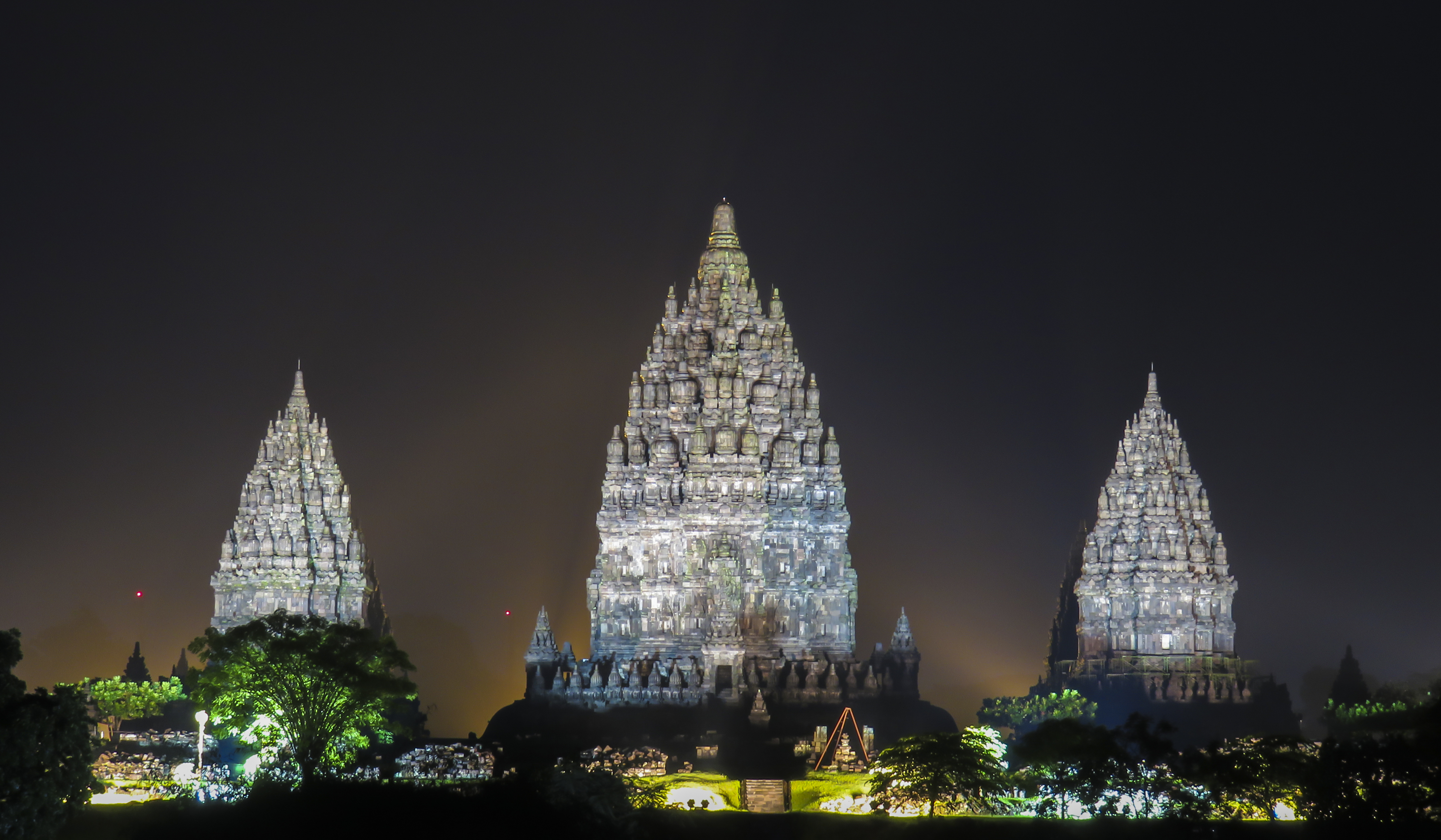 Candi Prambanan yang terletak di perbatasan Jawa Tengah dan Yogyakarta (Klaten-Sleman) ini merupakan candi Hindu paling indah di kawasan Asia Tenggara